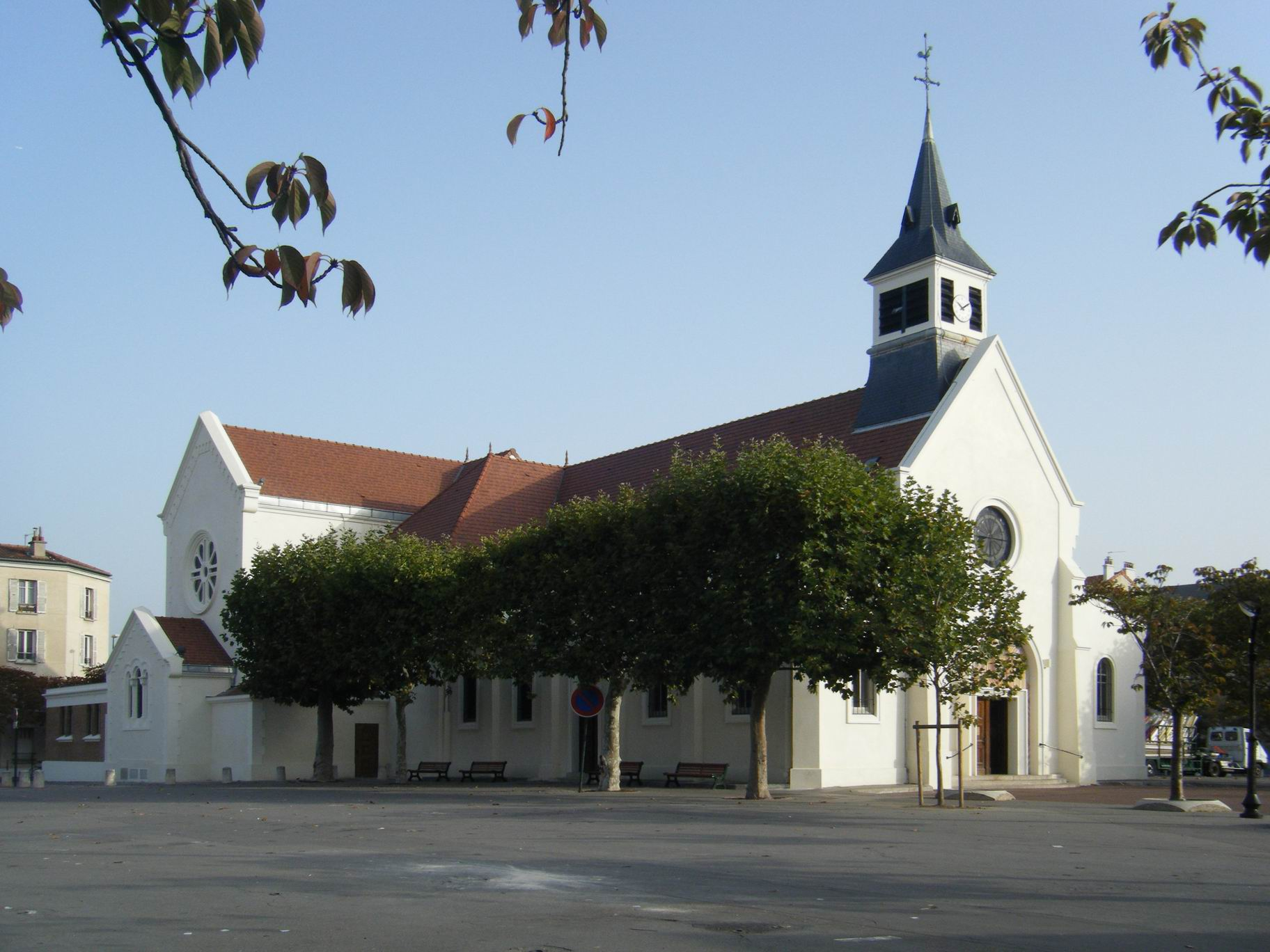 La première pierre est posée en 1866 et l’inauguration a lieu en 1875. En hommage à Urbain Sartoris, la chapelle est baptisée du prénom de celui-ci. Un ensemble de clercs et de laïcs dit « conseil de fabrique » est chargé d’administrer les fonds et revenus pour la construction et l’entretien d’une véritable église. En 1898, une souscription locale permet les premiers travaux d’agrandissement de la chapelle. La Garenne devient une paroisse en 1907 avec son église et son curé, le chanoine Vory. L’accroissement de la population conduit à des agrandissements et embellissements successifs : chœur et transept en 1934, vitraux du verrier d’art moderne Eric Bonte en 1987, réfection du toit, ravalement, éclairages intérieur et extérieur en 2008…